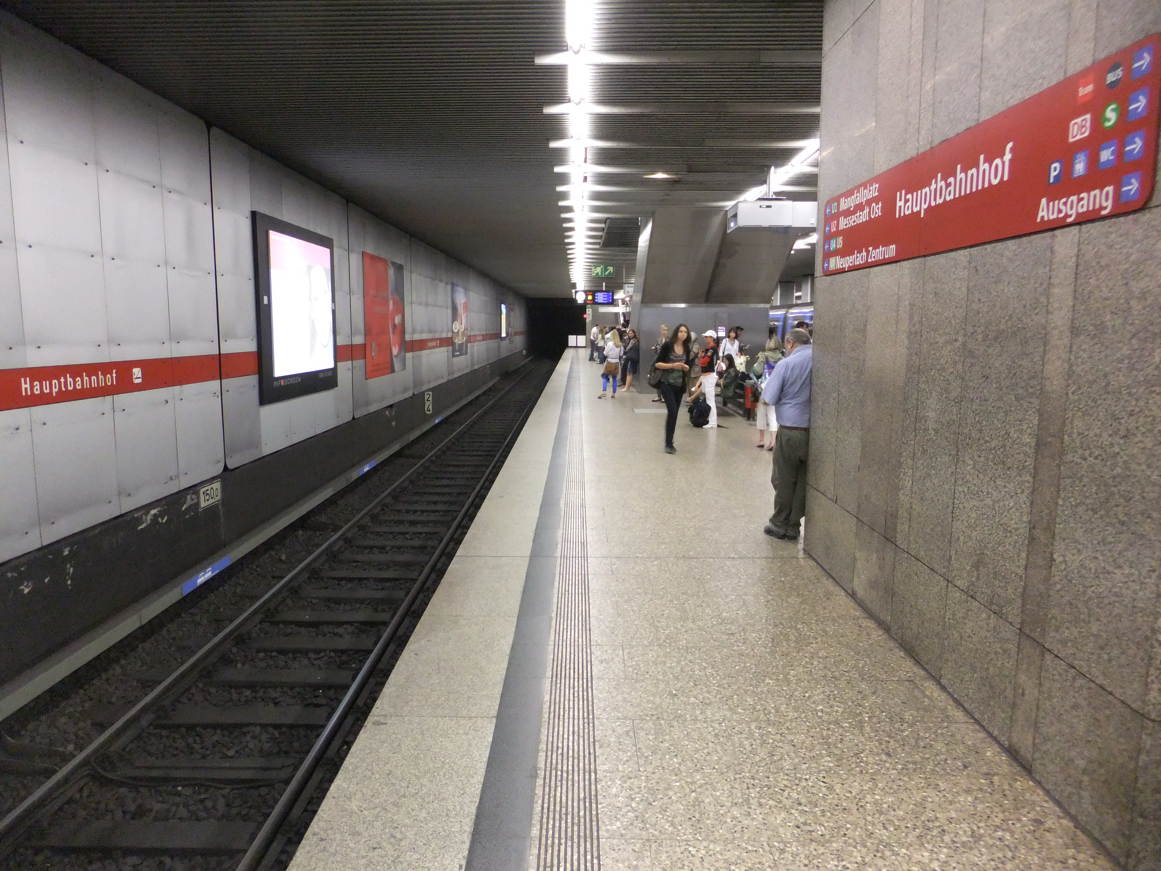 Die Bahnsteige des U-Bahnhofs des Münchener Hauptbahnhofs